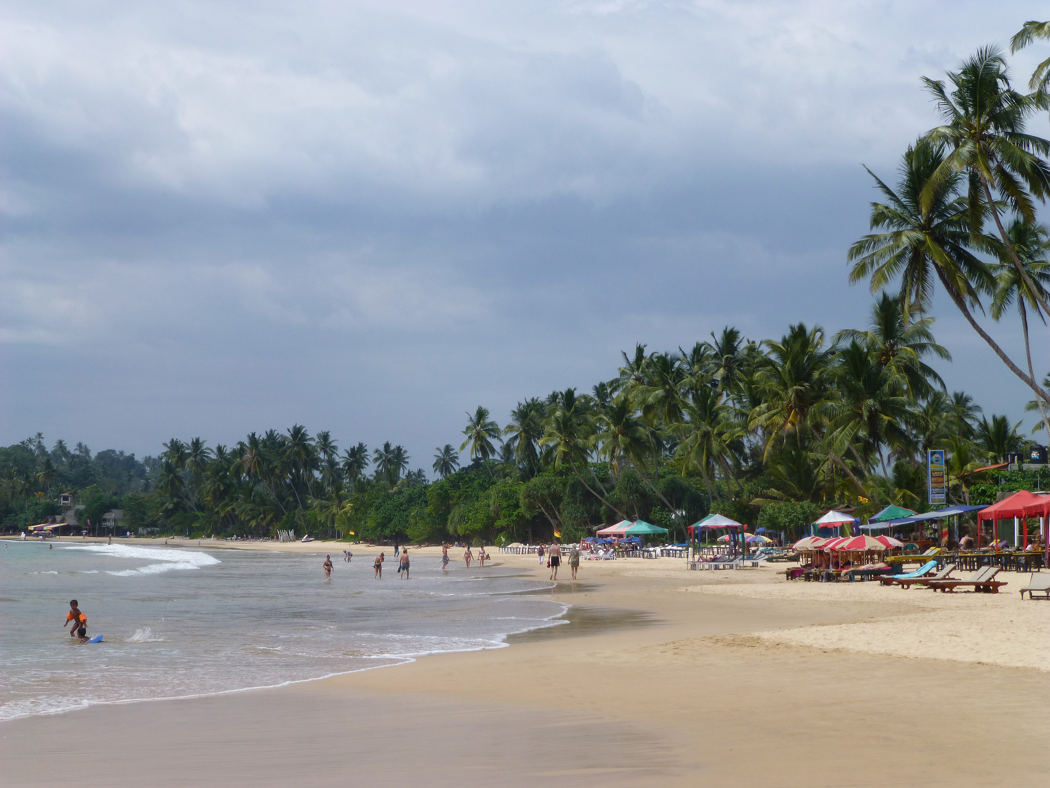 Plage de Mirissa (Sri Lanka)